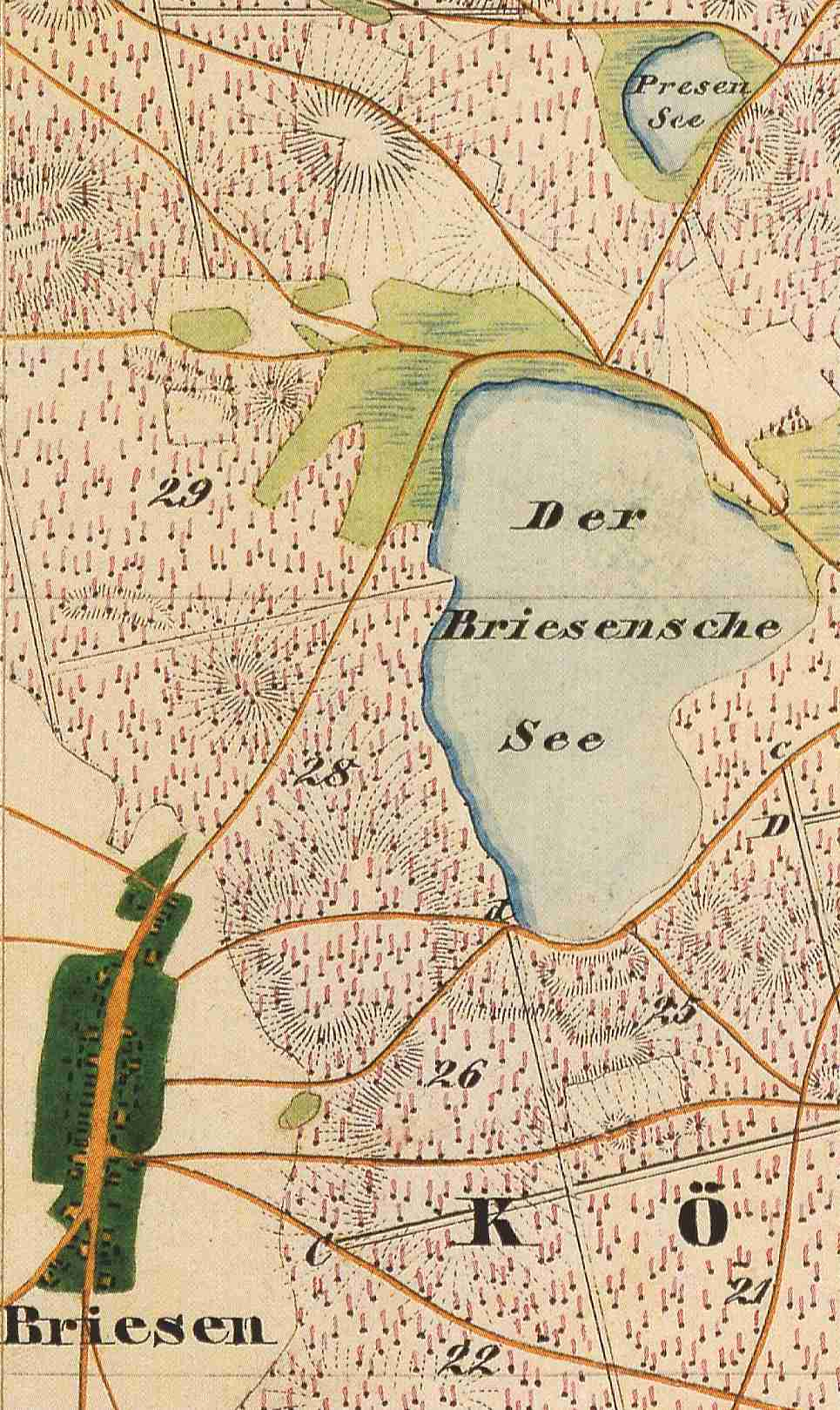 Briesensee, Ortsteil der Gemeinde Neu Zauche, Landkreis Dahme-Spreewald, Brandenburg, Deutschland, Ausschnitt aus dem Urmesstischblatt 4050 Straupitz von 1846